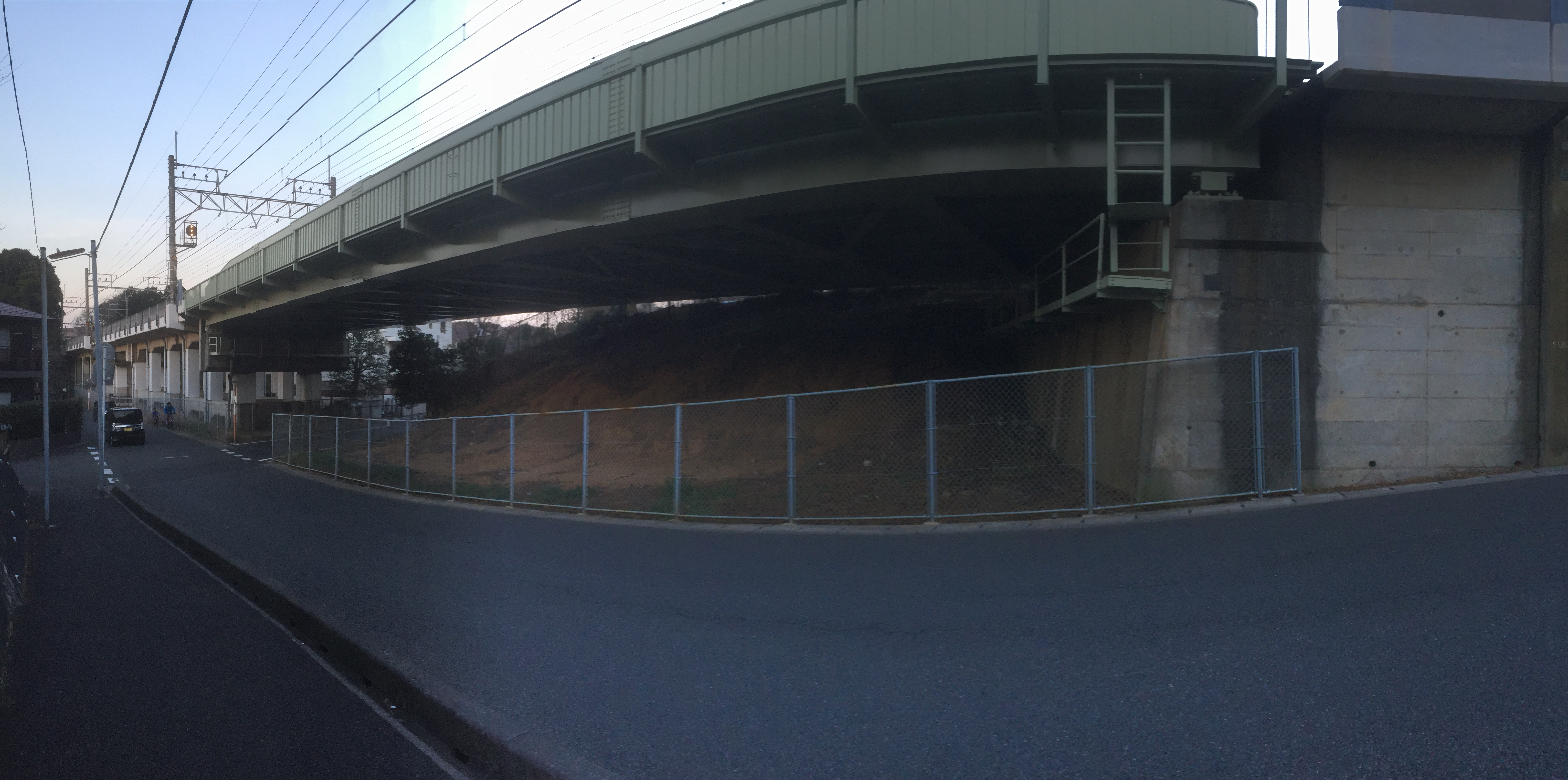 武蔵野線と成田新幹線が交差するはずだった箇所の鉄橋